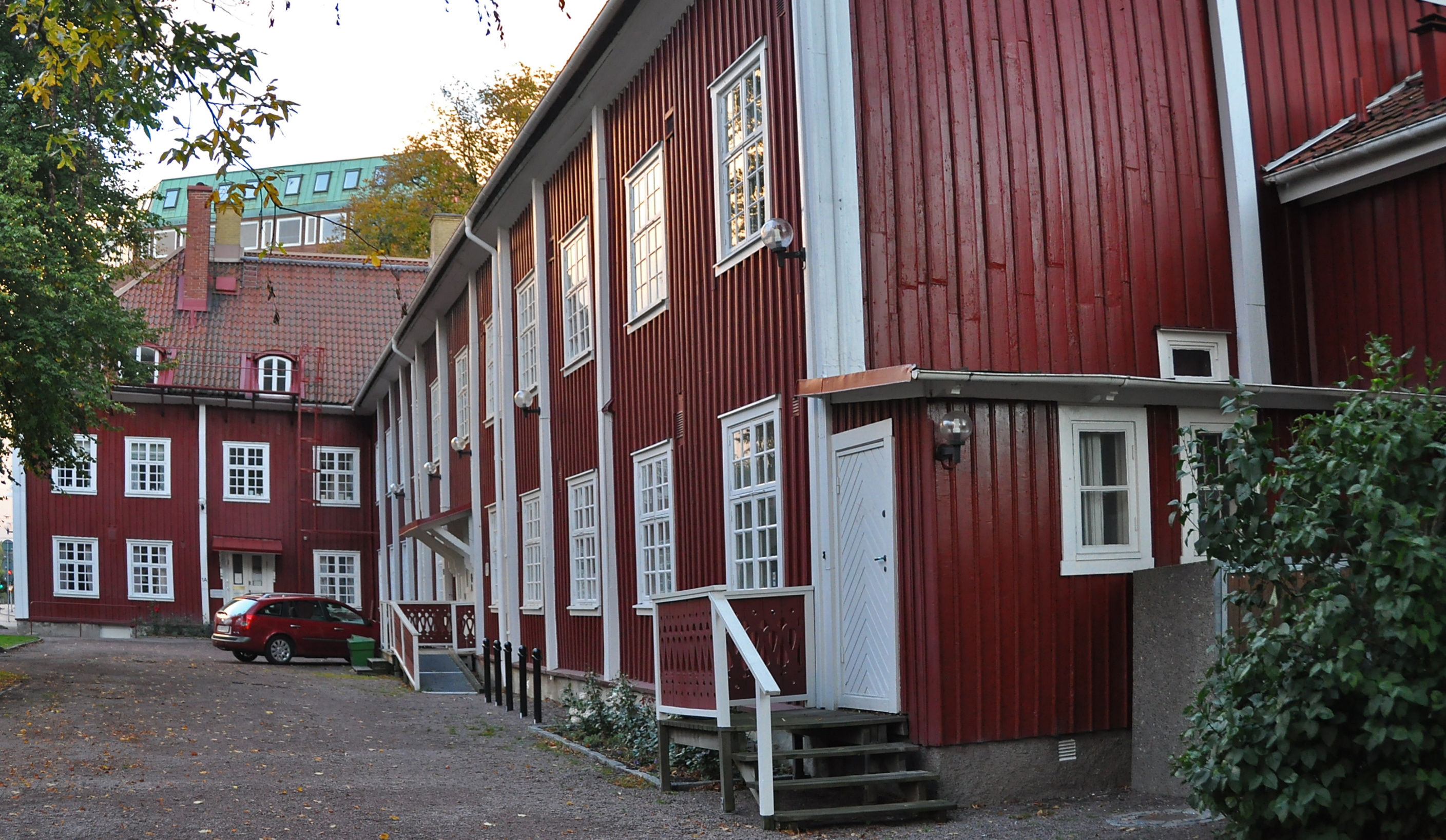 Gamla fattighuset i Göteborg, Stampen. Id.nr:21300000008198